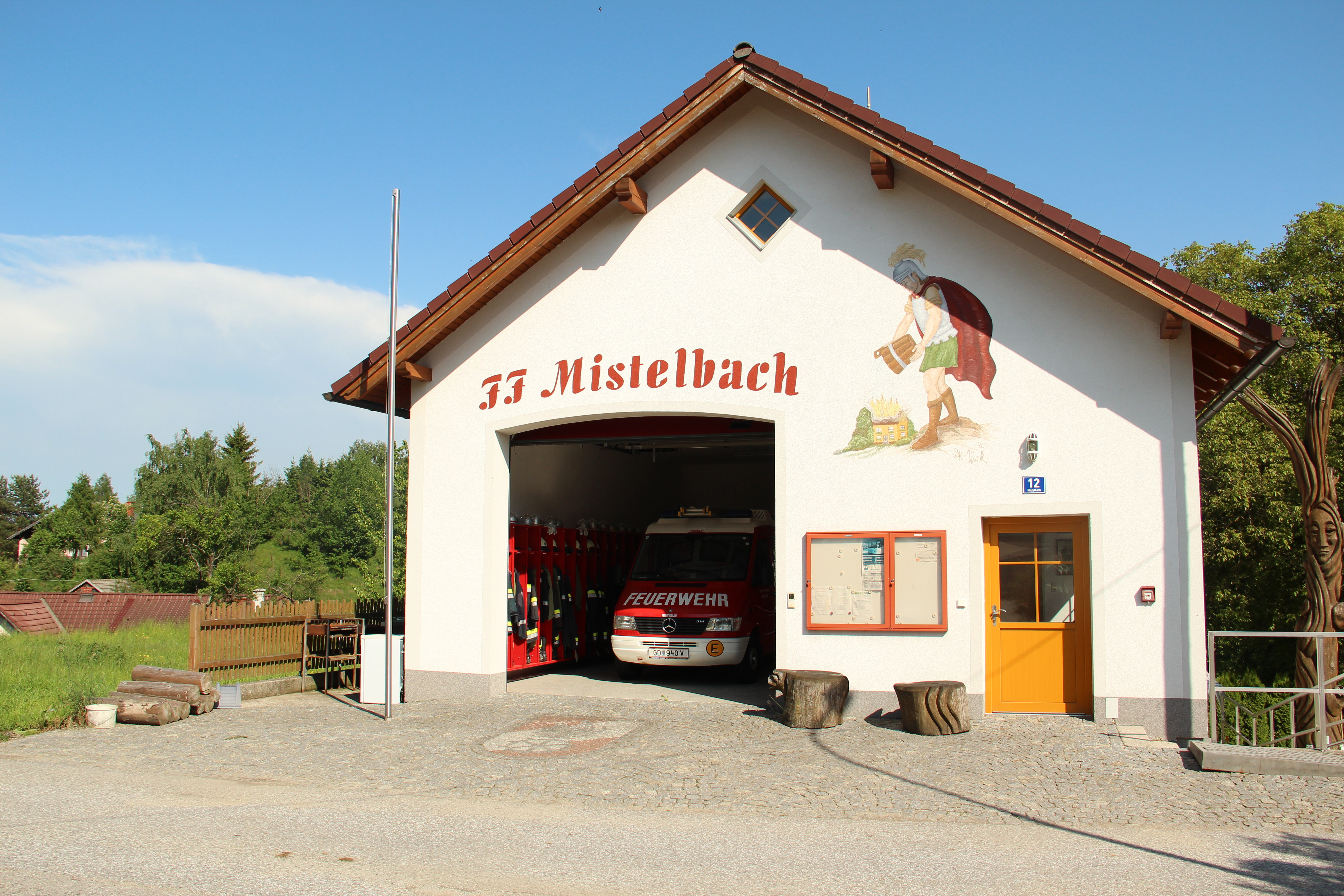 Auf diesem Bild ist das Feuerwehrhaus der Freiwilligen Feuerwehr Mistelbach in der Gemeinde Großschönau zu sehen.